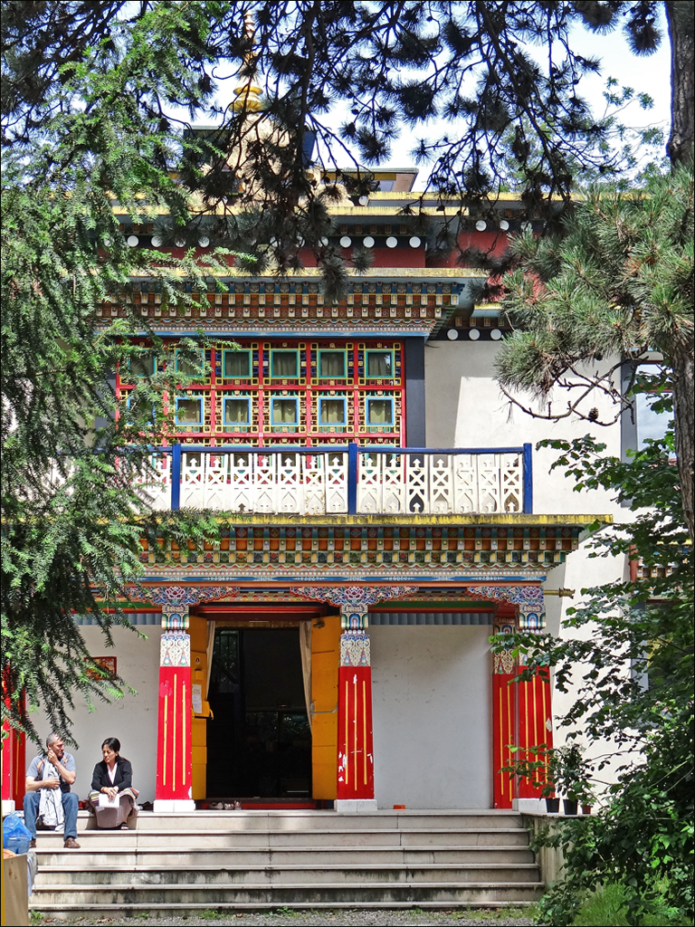 Façade du centre Kagyu Dzong Ouvert lors du 12e Festival culturel du Tibet et des peuples de l’Himalaya Le centre Kagyu Dzong est une pagode tibétaine, traditionnelle, édifiée en 1985, conçue par l'architecte Jean-Luc Massot selon les instructions de Kalou Rimpoché, grand maître tibétain mort en 1989. Ce centre est consacré à la lignée Kagyupa du bouddhisme tibétain. Les quatre piliers du bâtiment symbolisent les « Quatre Nobles Vérités » énoncées par le Bouddha au parc des gazelles à Sarnath prés de Bénarès et la marquise qui surplombe l'entrée rappelle la prééminence du spirituel sur le matériel. De même que la flèche qui s'érige au-dessus du temple est le symbole de la vacuité, notion particulièrement développée dans le Mahayana ou grand véhicule dont le bouddhisme tibétain ou Vajrayana, constitue une extension logique. Sur la façade, le dharma-chakra entouré de deux gazelles symbolise le premier sermon du Bouddha. Ce centre est habité à l'année et de nombreuses cérémonies et enseignements y sont donnés régulièrement par des lamas invités ou résidents. Extraits du site officiel